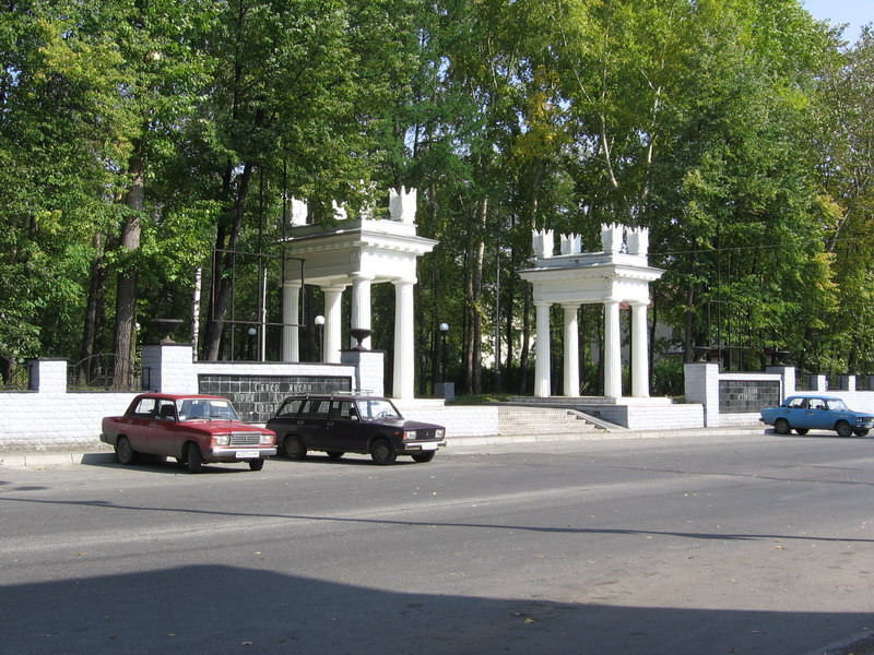 Сквер им. Гагарина в центре г. Лесной